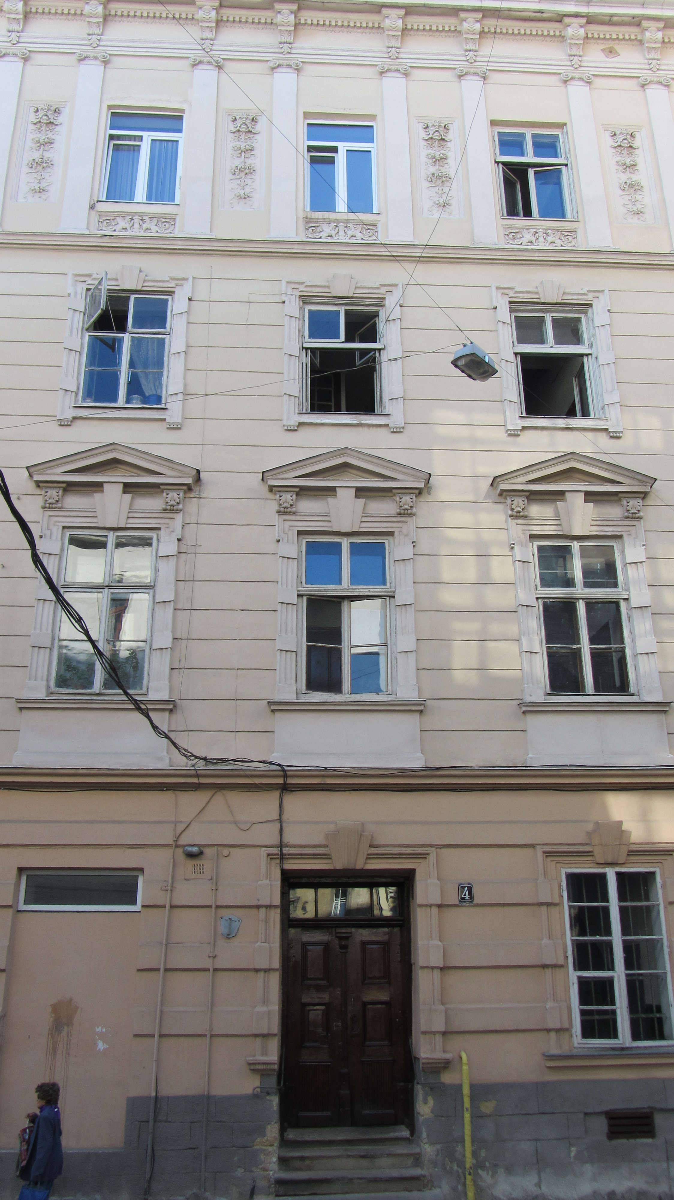 Житловий будинок, Львів, вул. Валова, 4